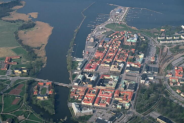 Motiv: Mariestad Nyckelord: Flygbilder, Riksintressen Kategori: Stadsmiljö Mariestad